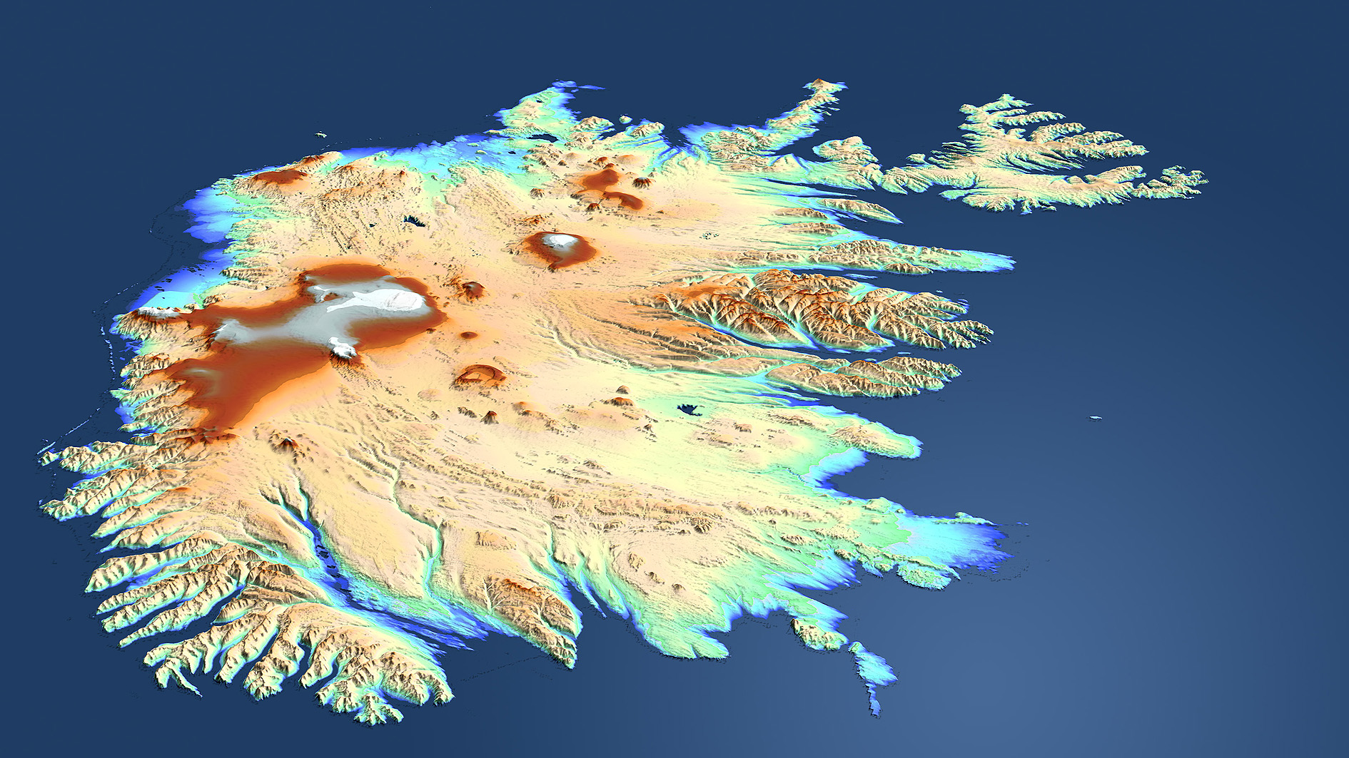 Die Abbildung zeigt das Höhenmodell Islands, dass durch die TanDEM-X-Mission des DLRs 2011 gewonnen werden konnte.